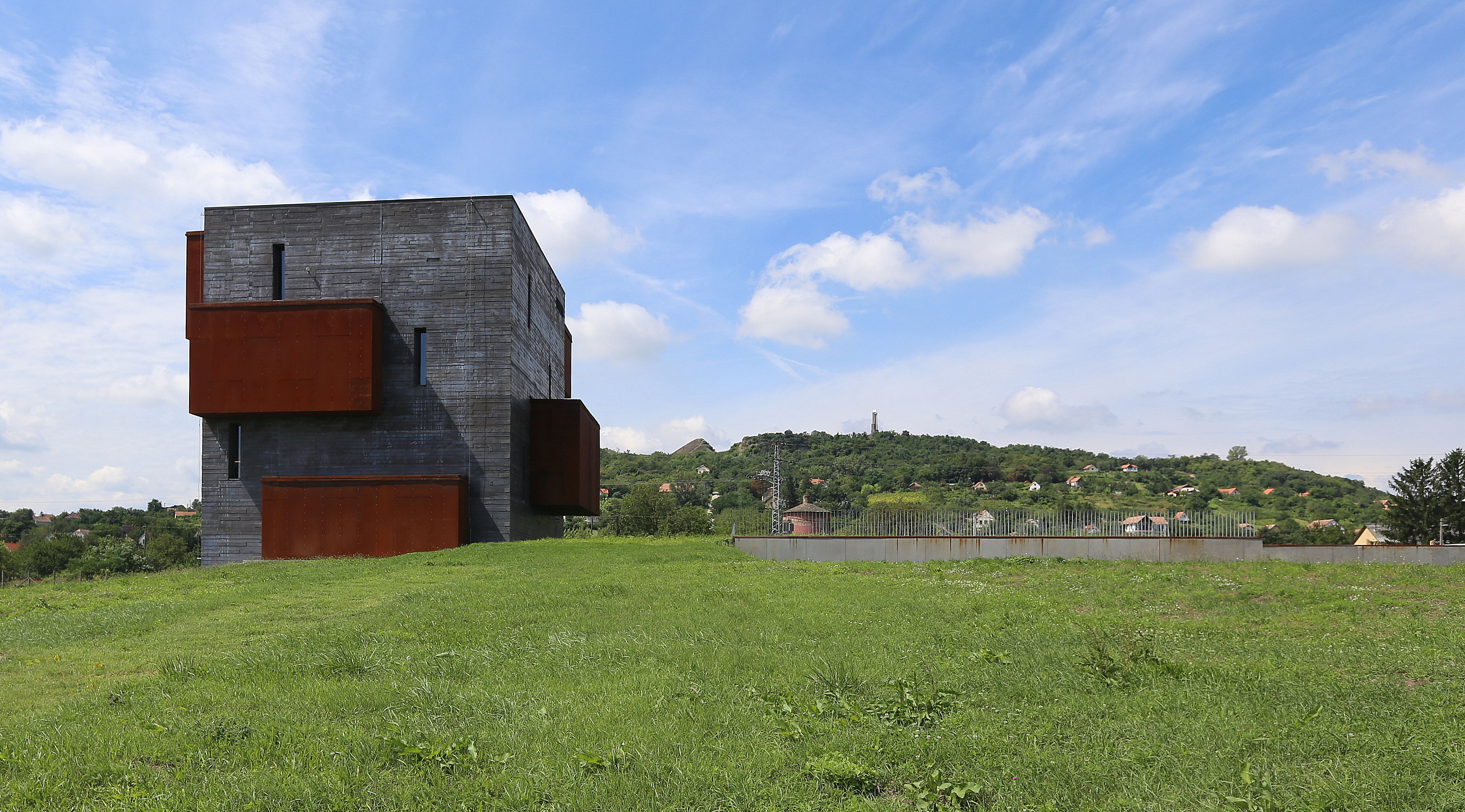 Kemenes Vulkánpark Látogatóközpont a Ság hegy lábánál, Celldömölk, Sághegyalja körút 1 Épület: Szürke színű beton és a vörös árnyalatú Cor-ten acél. Terv: Földes és Társai Építésziroda. Kiállítótermek. ( kemenesvulkanpark.hu )Kemenes Volcane Park Exhibition concept: Gábor Sz. Szilágyi. Architect and internal designer: Földes és társa építésziroda. WEB: (en)